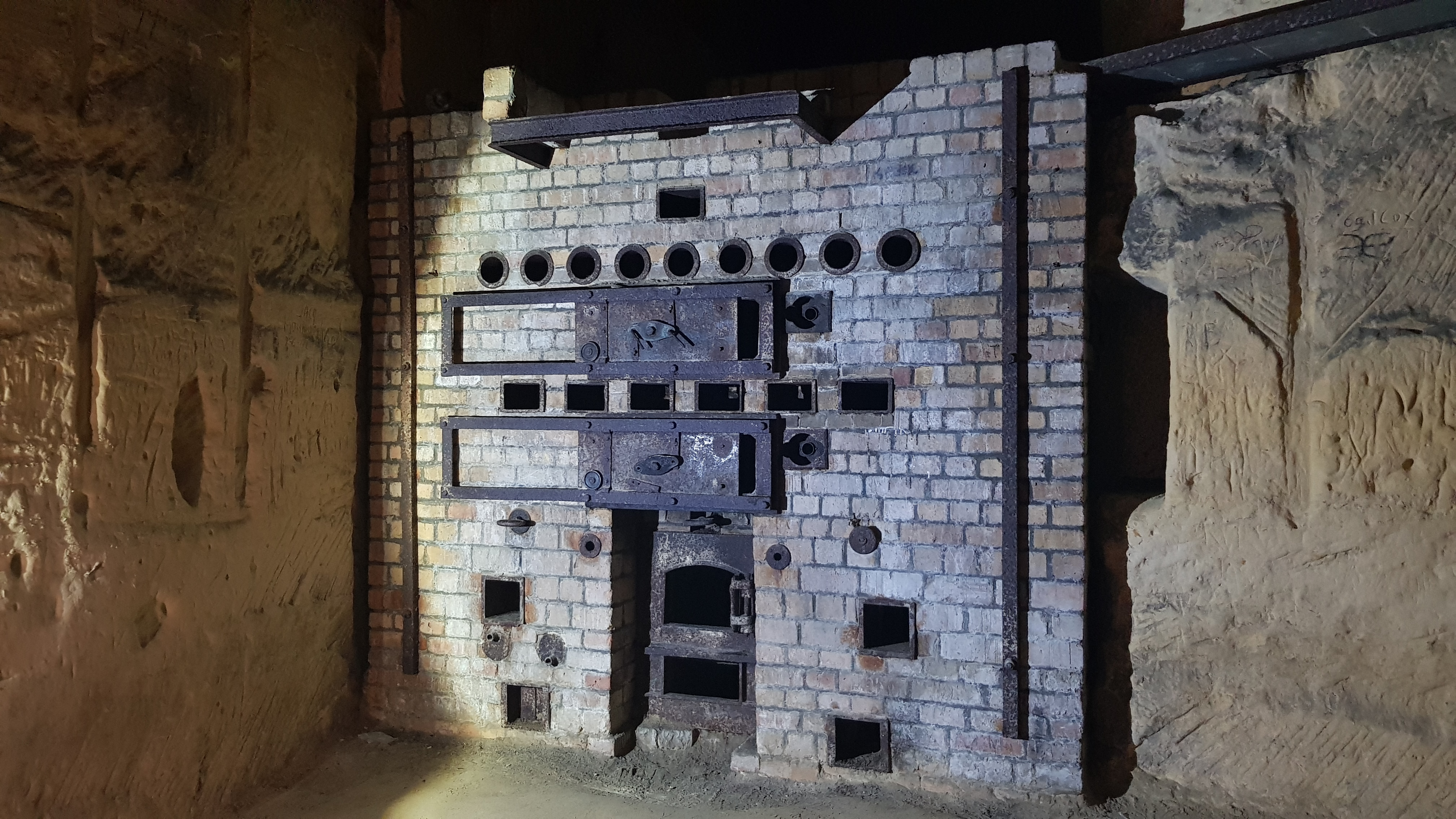 Gangenstelsel Zonneberg in de Sint-Pietersberg, Maastricht, Nederland